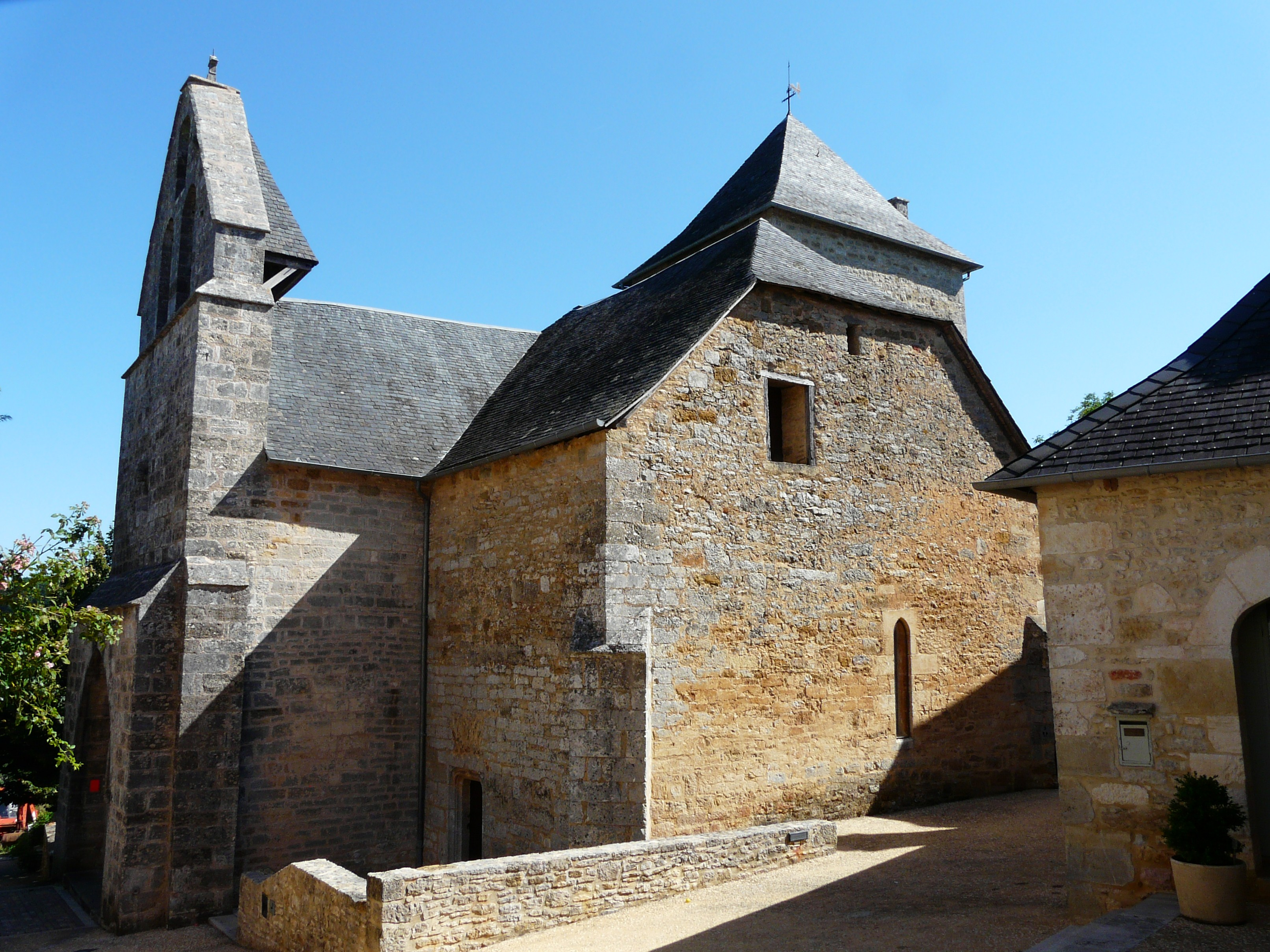 L'angle sud-ouest de l'église Notre-Dame de La Dornac, Dordogne, France.